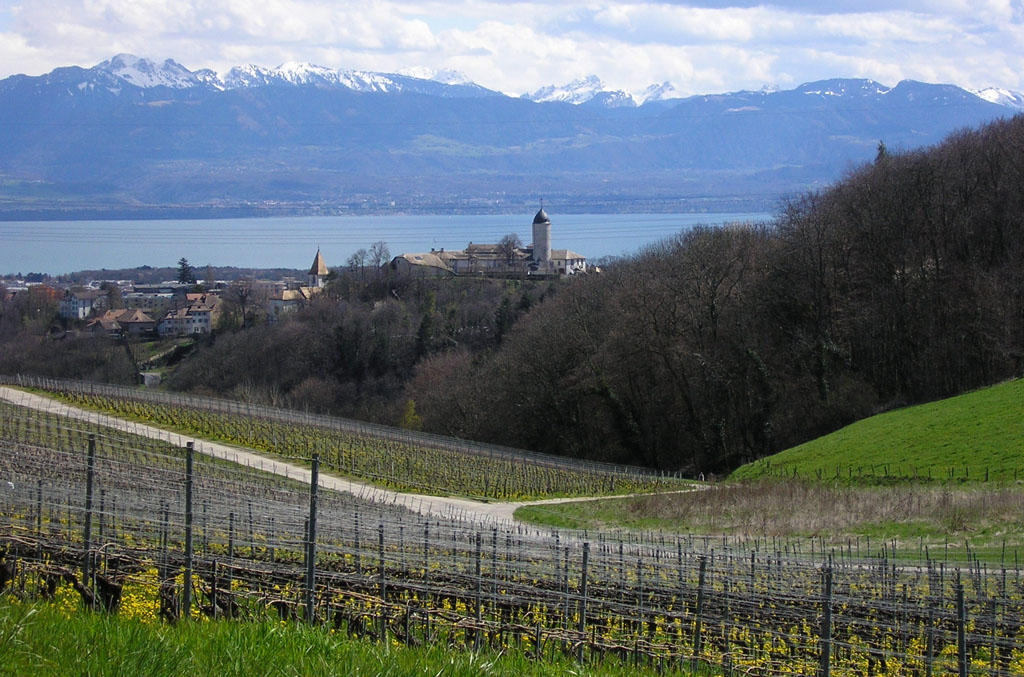 Vue d'Aubonne (depuis Saint-Livres), canton de Vaud, Suisse.